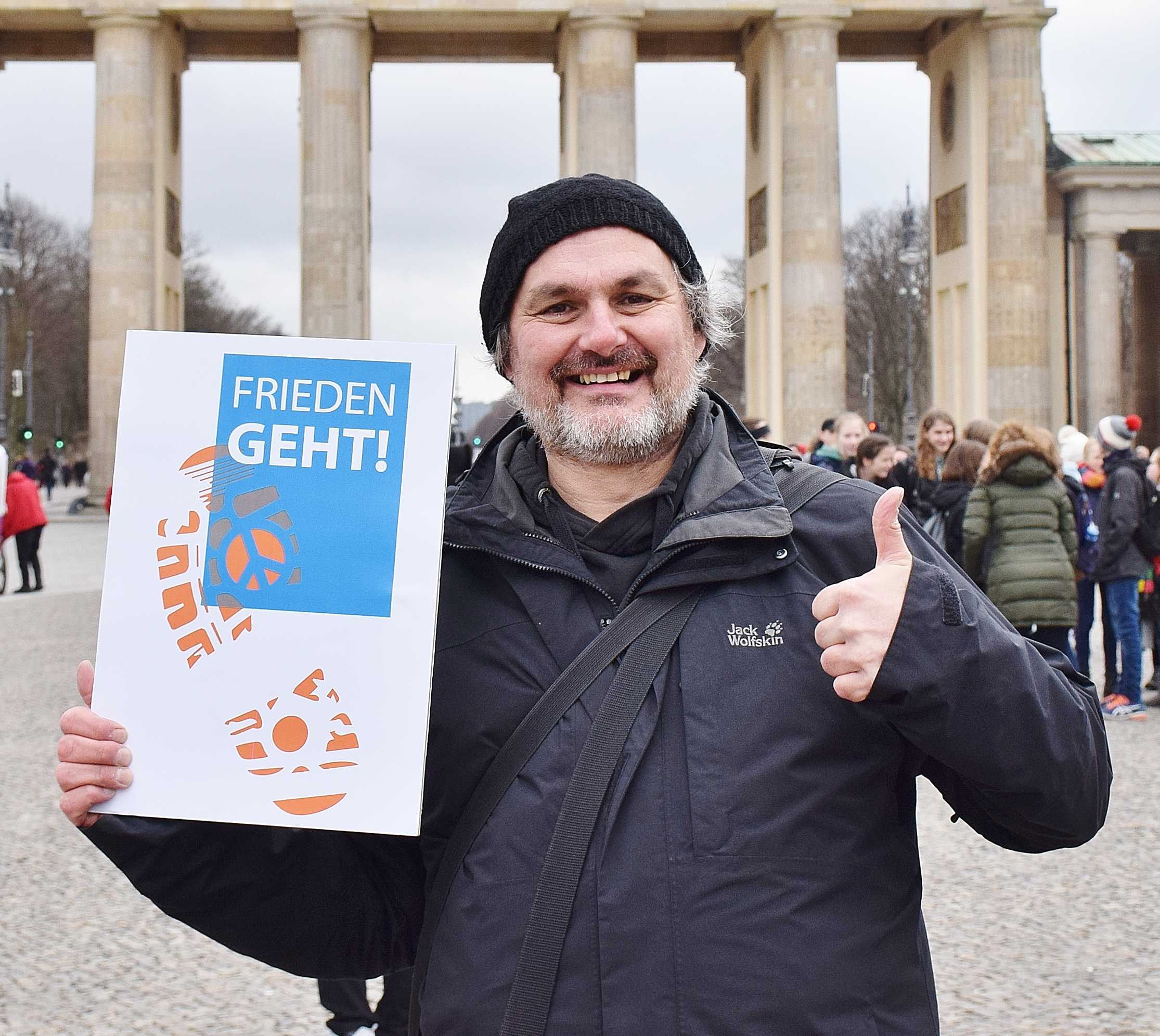 Berliner Aktivist*innen vom Bündnis "Frieden geht!" trafen sich vor dem Brandenburger Tor um gemeinsam gegen Rüstungsexporte zu demonstrieren. Foto: Uwe Hiksch